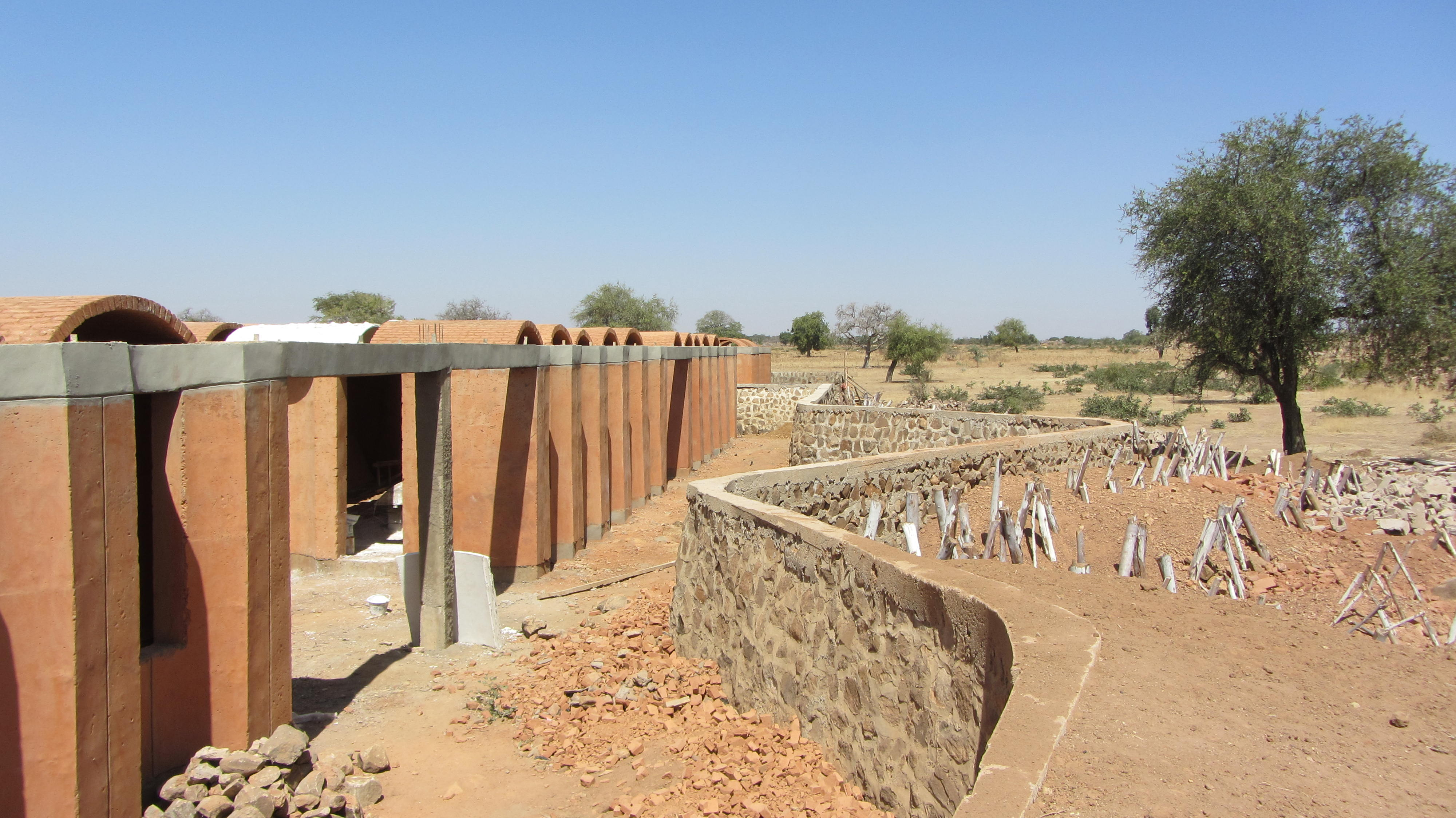 The secondary school in Gando, Burkina Faso, is currently under construction. Designed by Francis Kéré.